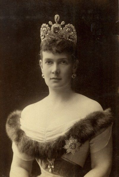 Великая княгиня Мария Павловна (1854-1920), герцогиня Мекленбург-Шверинская